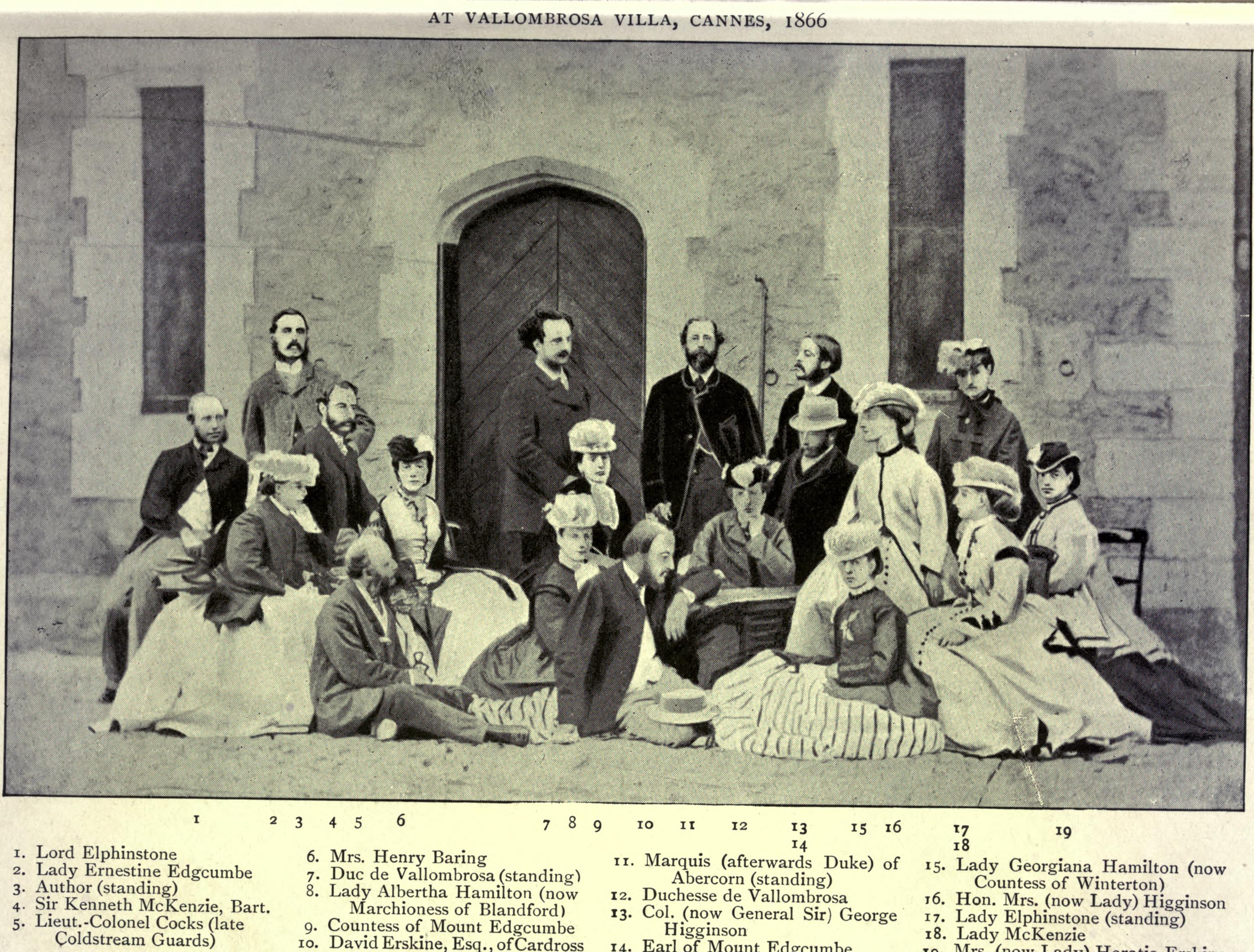 Vallombrosa Villa, Cannes, 1866.